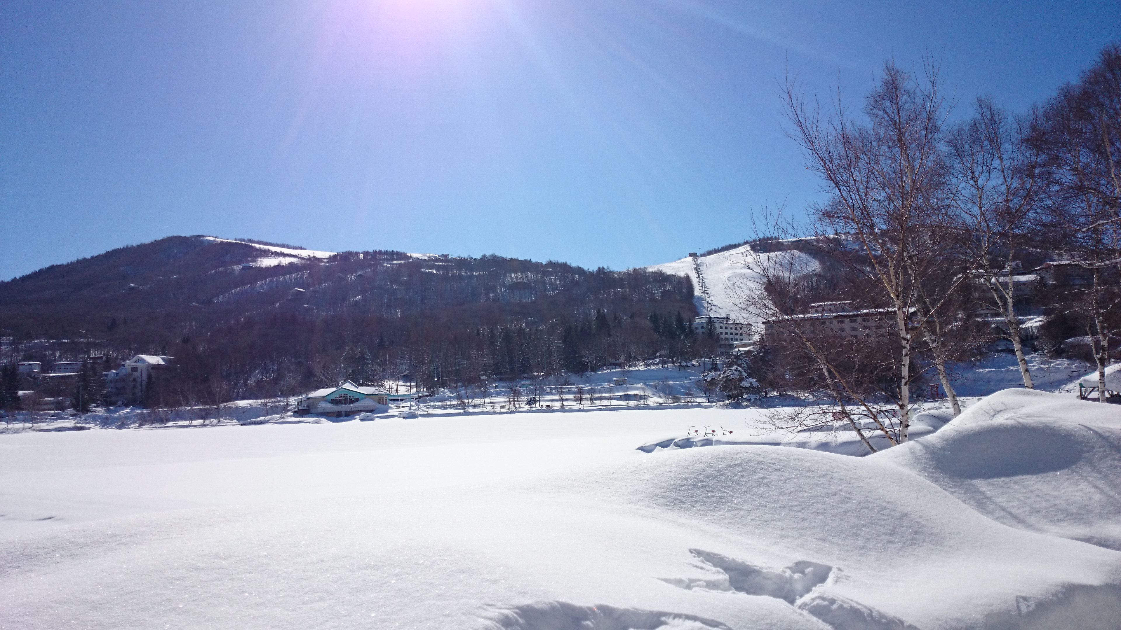 白樺湖ロイヤルヒルスキー場 SO-02Fにて撮影